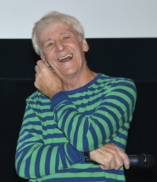 Colin Nutley under presentation av den Svenska filmhösten 2014 på Bio Victor i Filmhuset i Stockholm den 18 augusti 2014. Arrangörer: Svenska Filminstitutet och Film&TV-Producenterna.